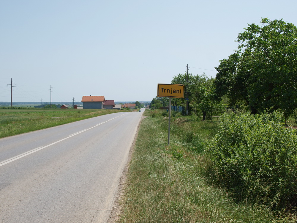 Ulaz u selo Trnjani, Brodsko-posavska županija.